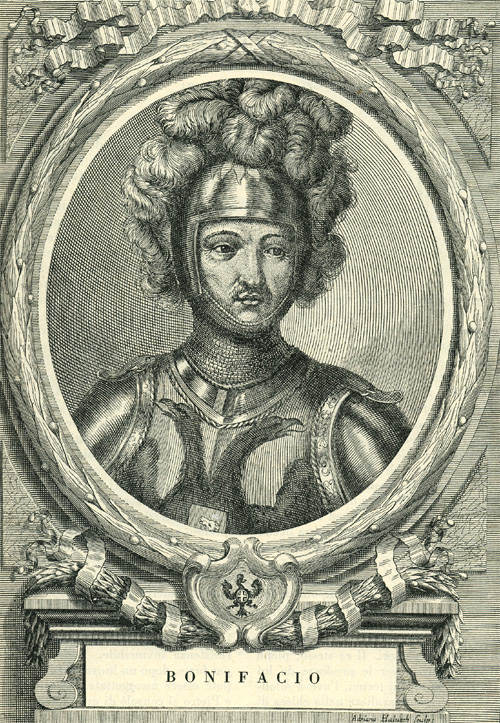 Bonifacio di Savoia (1243-1263)